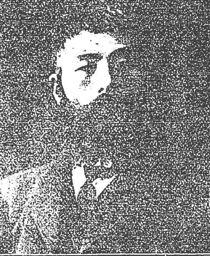 a Japanese man 杉原鐡城 (Tetsujo Sugihara)